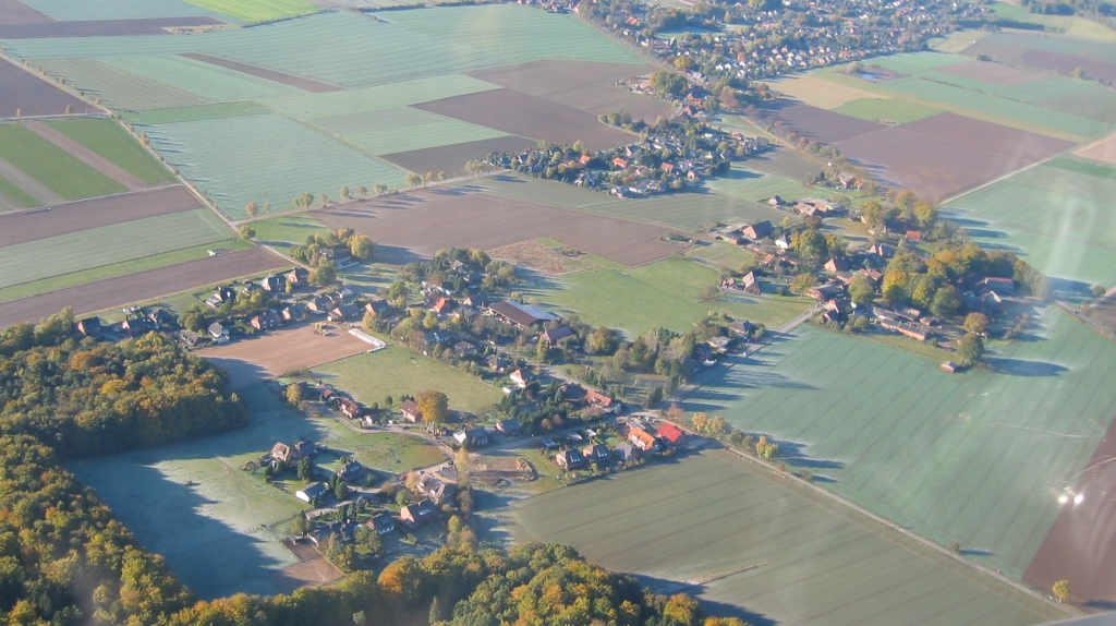 Iddensen, Gemeinde Rosengarten, Ansicht beim Anflug aus NO